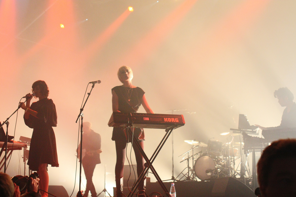 Ladytron